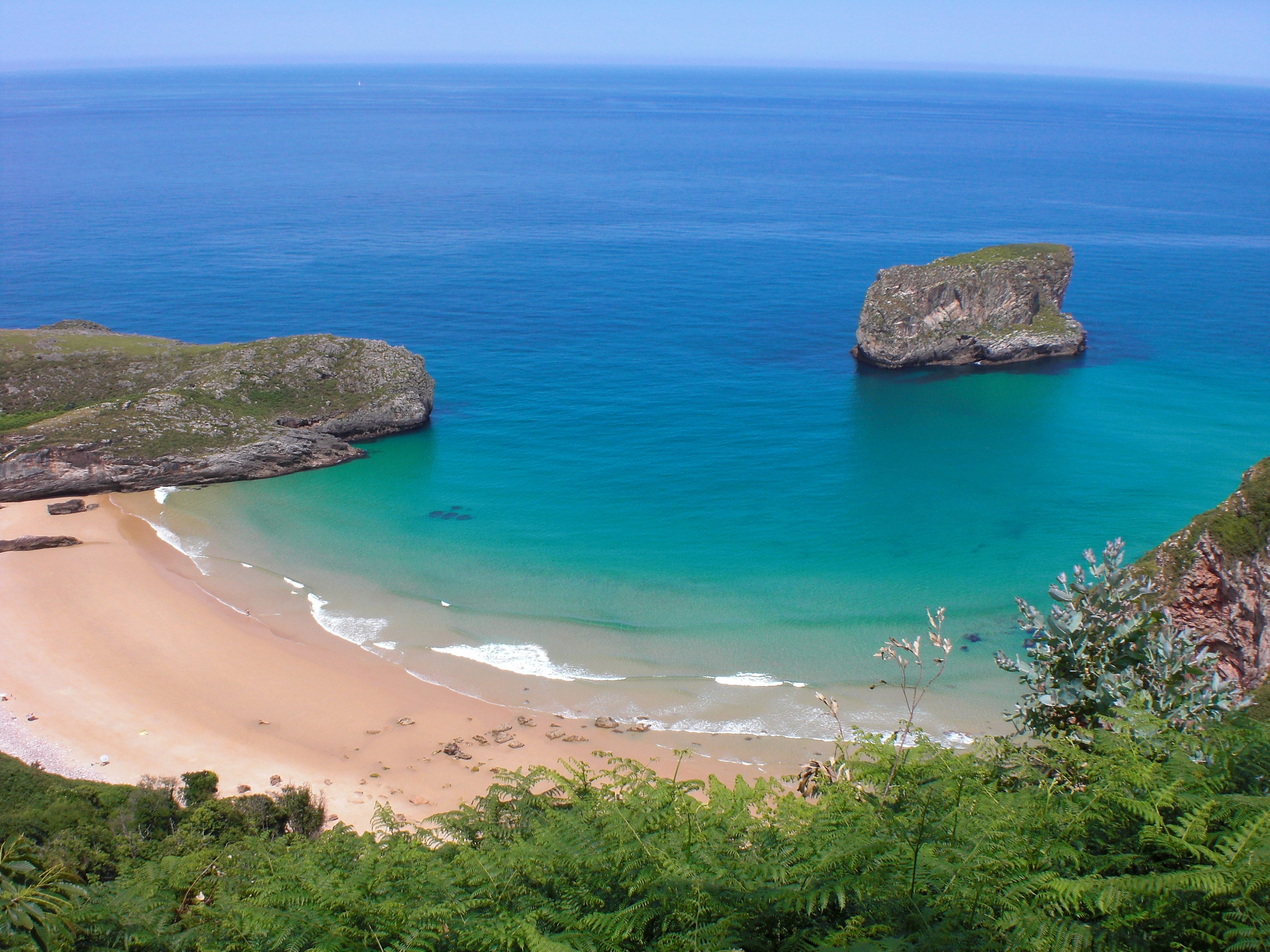 Playa de La Ballota en el concejo de Llanes. Principado de Asturias.